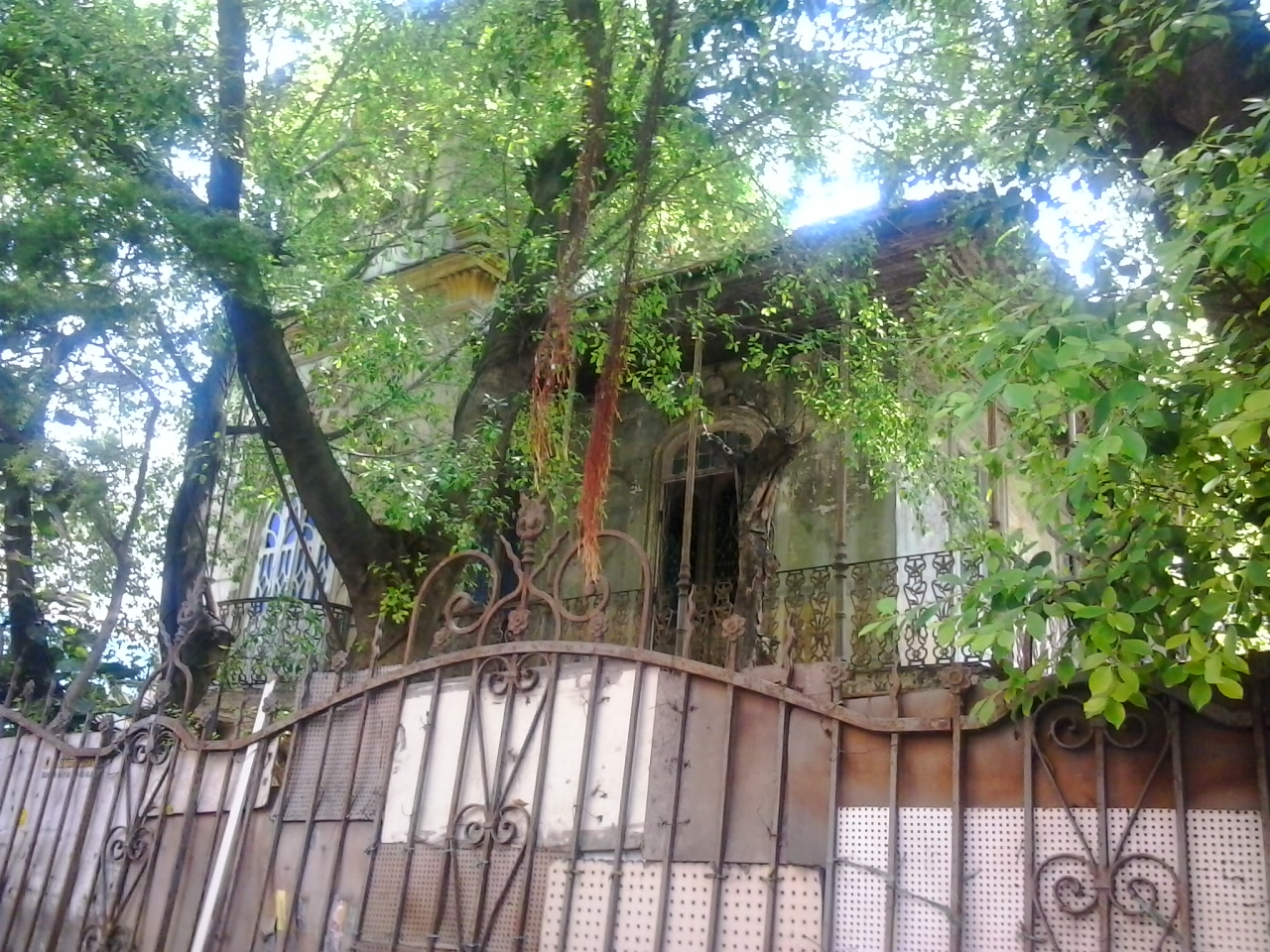 Casa de Norival de Freitas